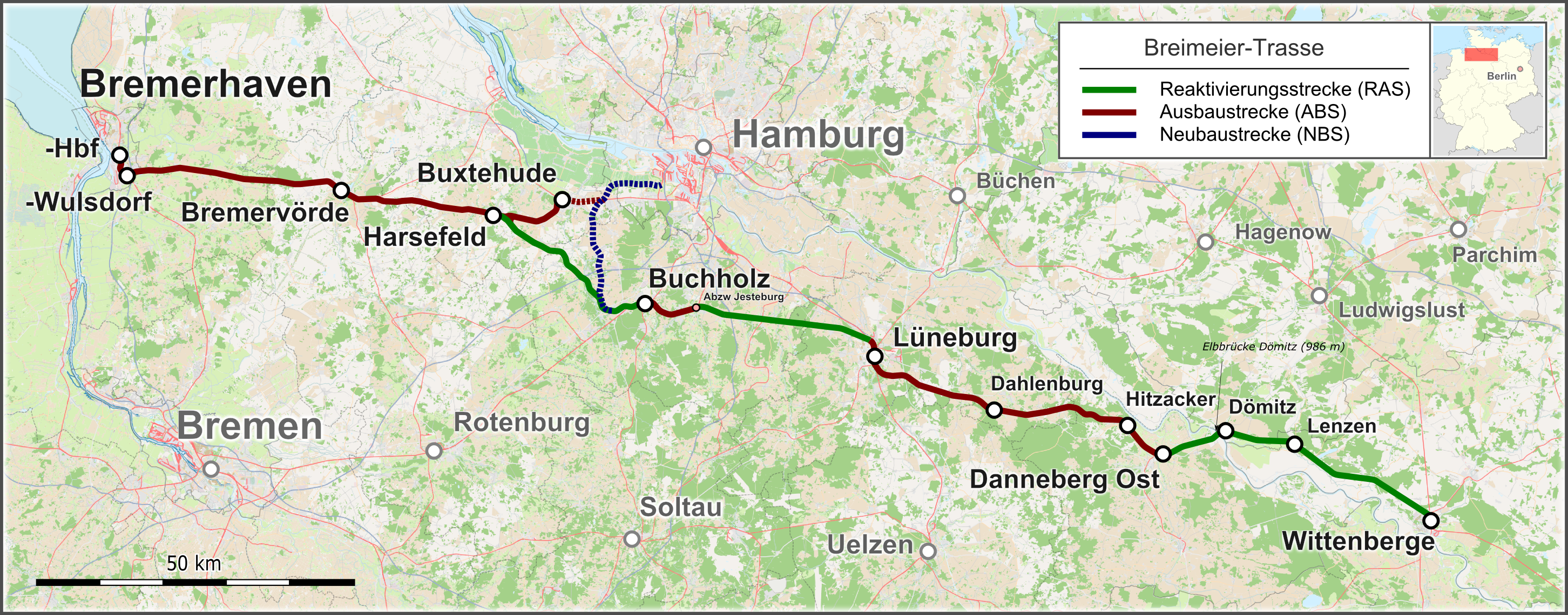 Verlauf der Breimeier-Trasse. Alternativvorschlag zur Y-Trasse, der die Knoten Bremen und Hamburg-Harburg entlastet.